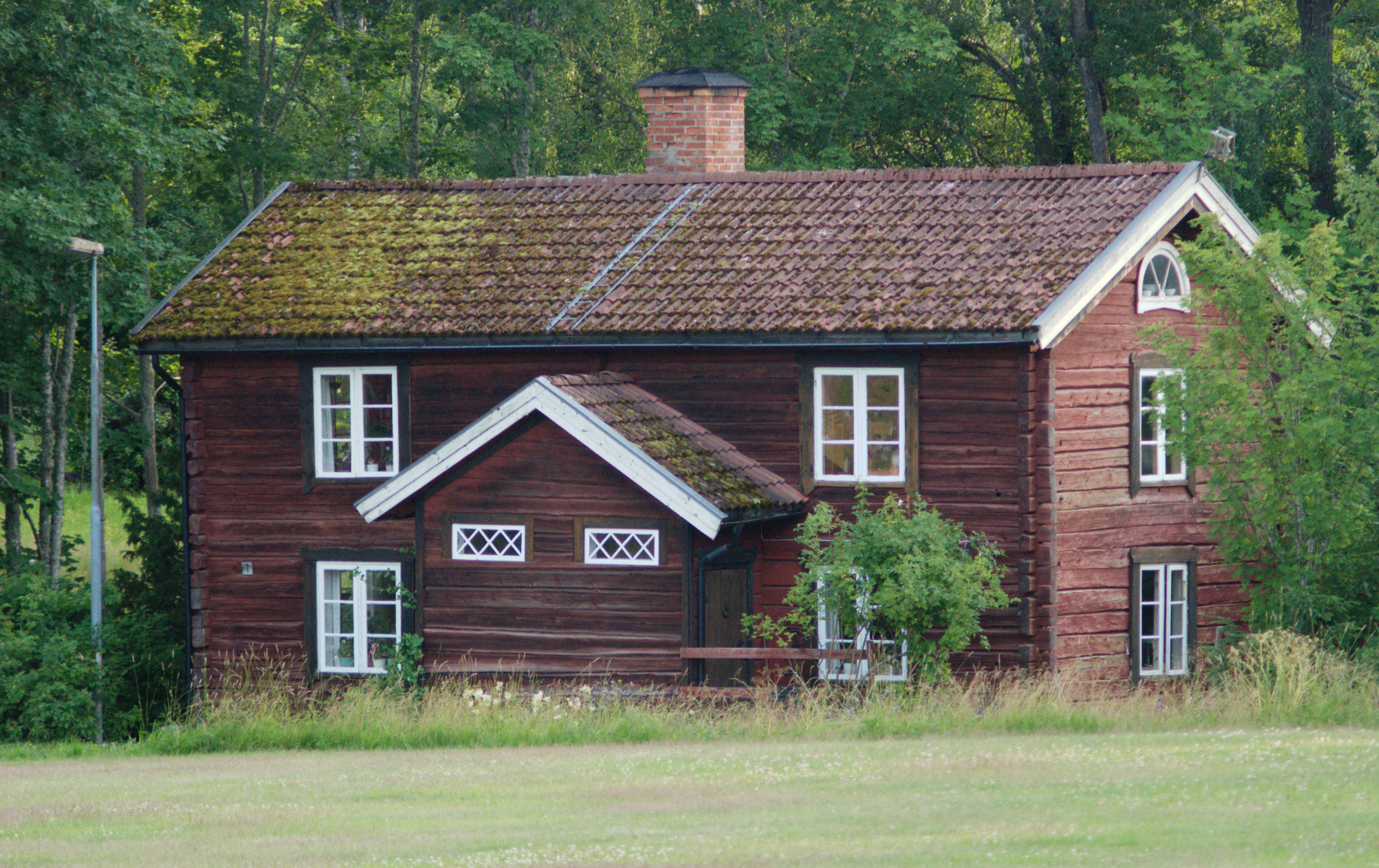 Skjutsstationen i Upperud, Nyeds socken. Hus från 1680-talet.